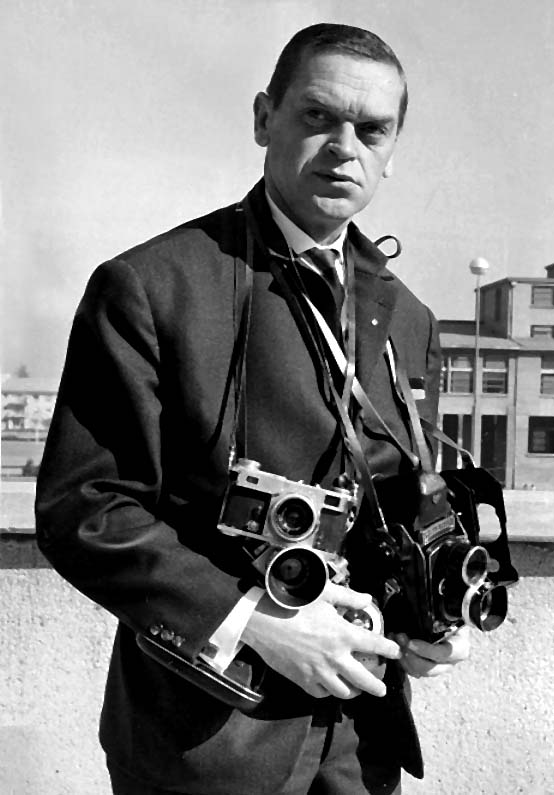 Walter Dick 1968 während einer Sportreportage